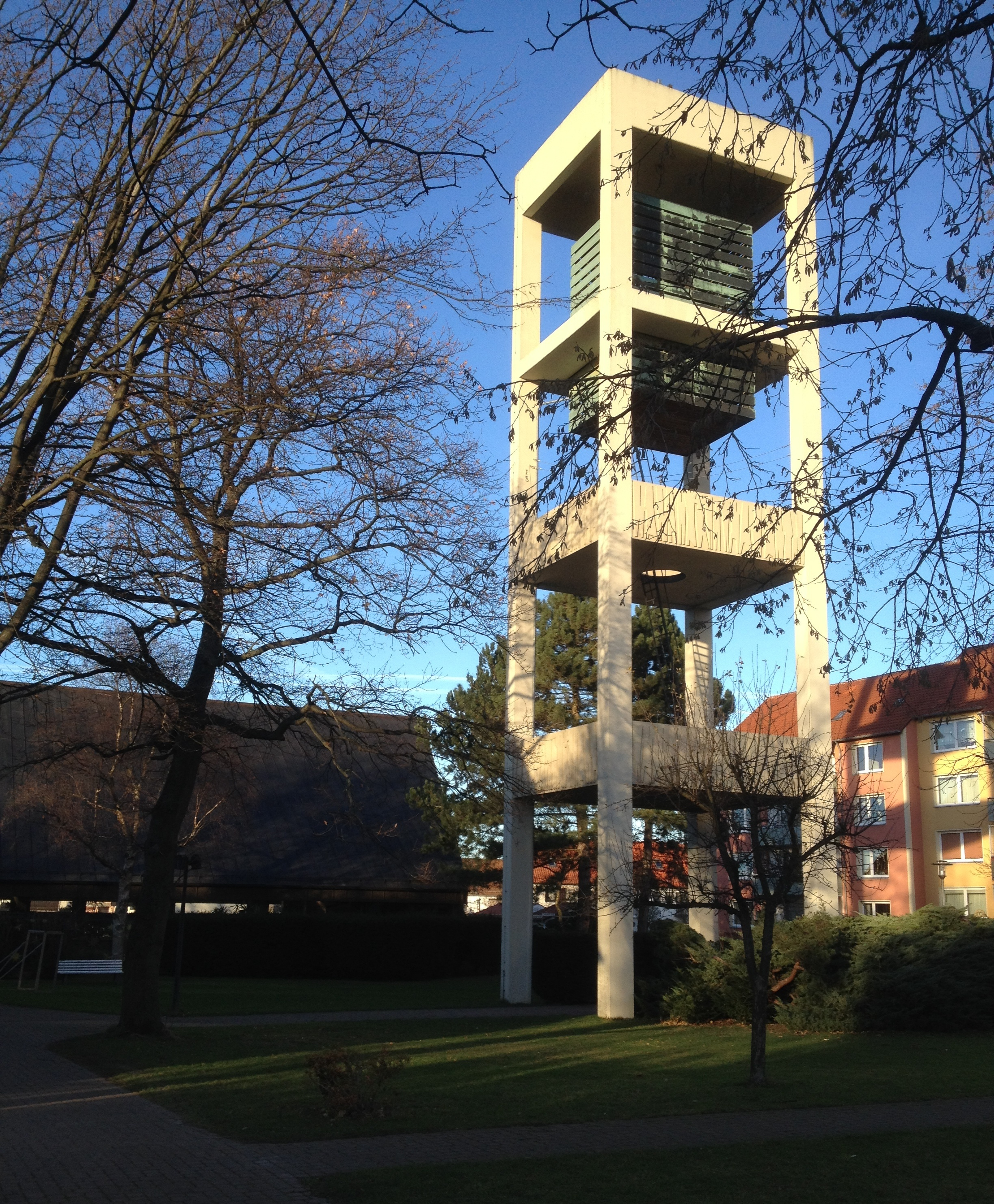 Goslar-Jürgenohl, ev.-luth. Kirche St. Georg